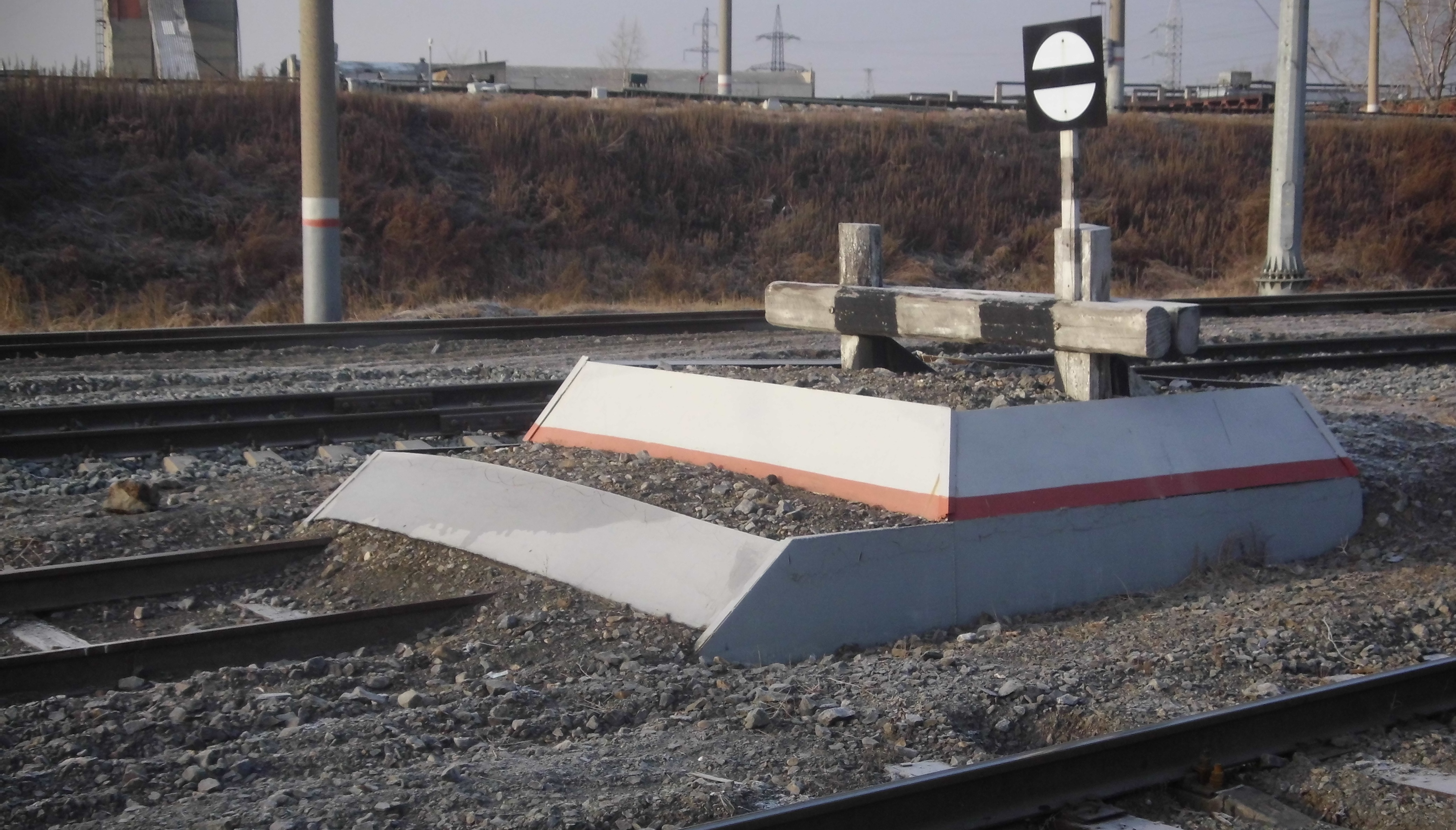 Тупиковая призма на тупиковом ответвлении от стрелочного перевода у входных ворот станции в железнодорожную станцию. Стойки из шпал и приваренных к пути отрезков из рельсов, всё это огорожено листовой сталью на сварке и засыпано щебнем.